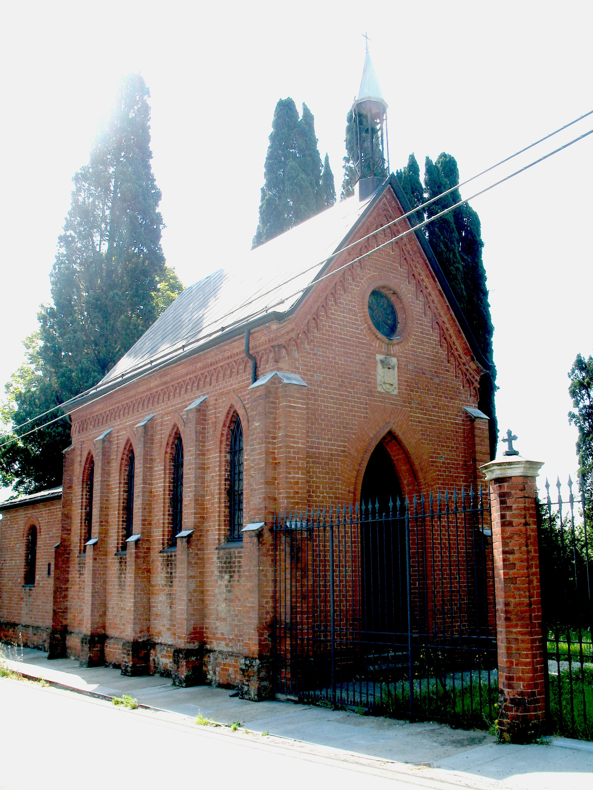 Cappella mortuaria dei Conti Cacherano-Bricherasio, a Fubine, Piemonte, Italia.